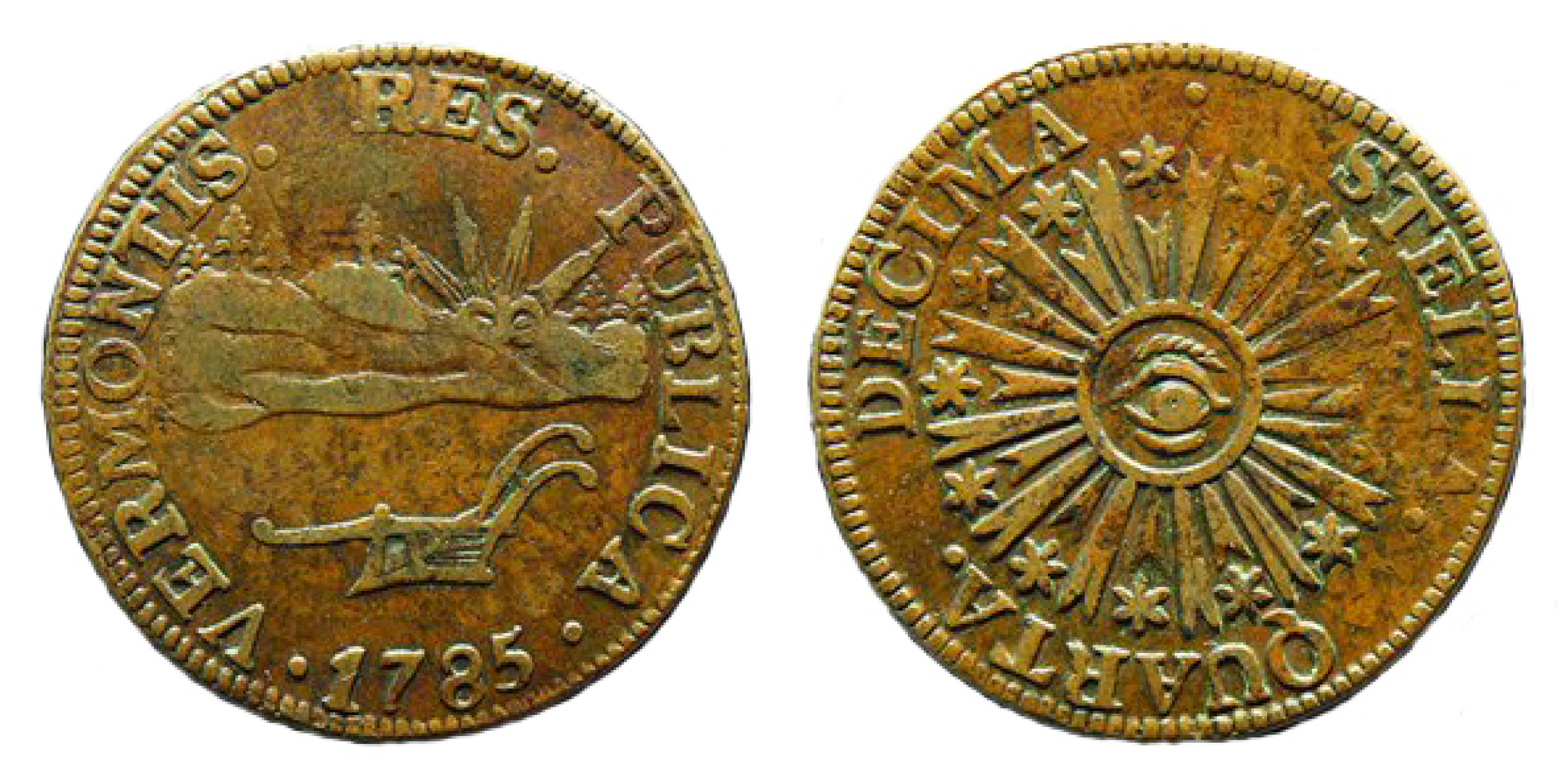 Vermont copper coinage struck, 1785–1786.